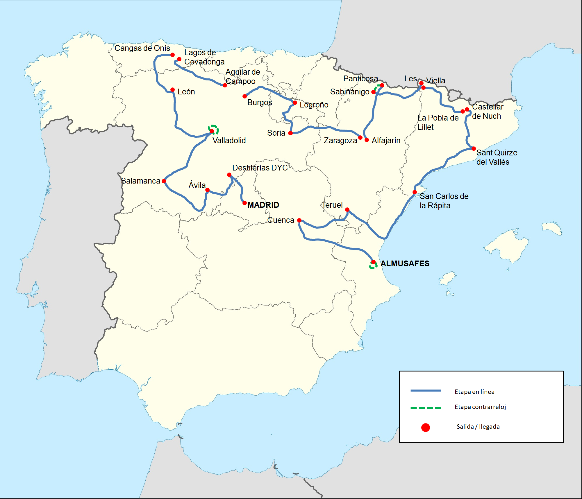 Recorrido de la Vuelta a España de 1983.